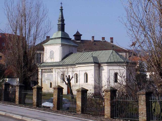 Srpskohrvatski / српскохрватски: Crkva sv. proroka Ilije u Mirijevu, iz 19. veka. Zgrada iza crkve je nekada bila škola, a danas je u njoj sedište mesne zajednice Mirijevo.